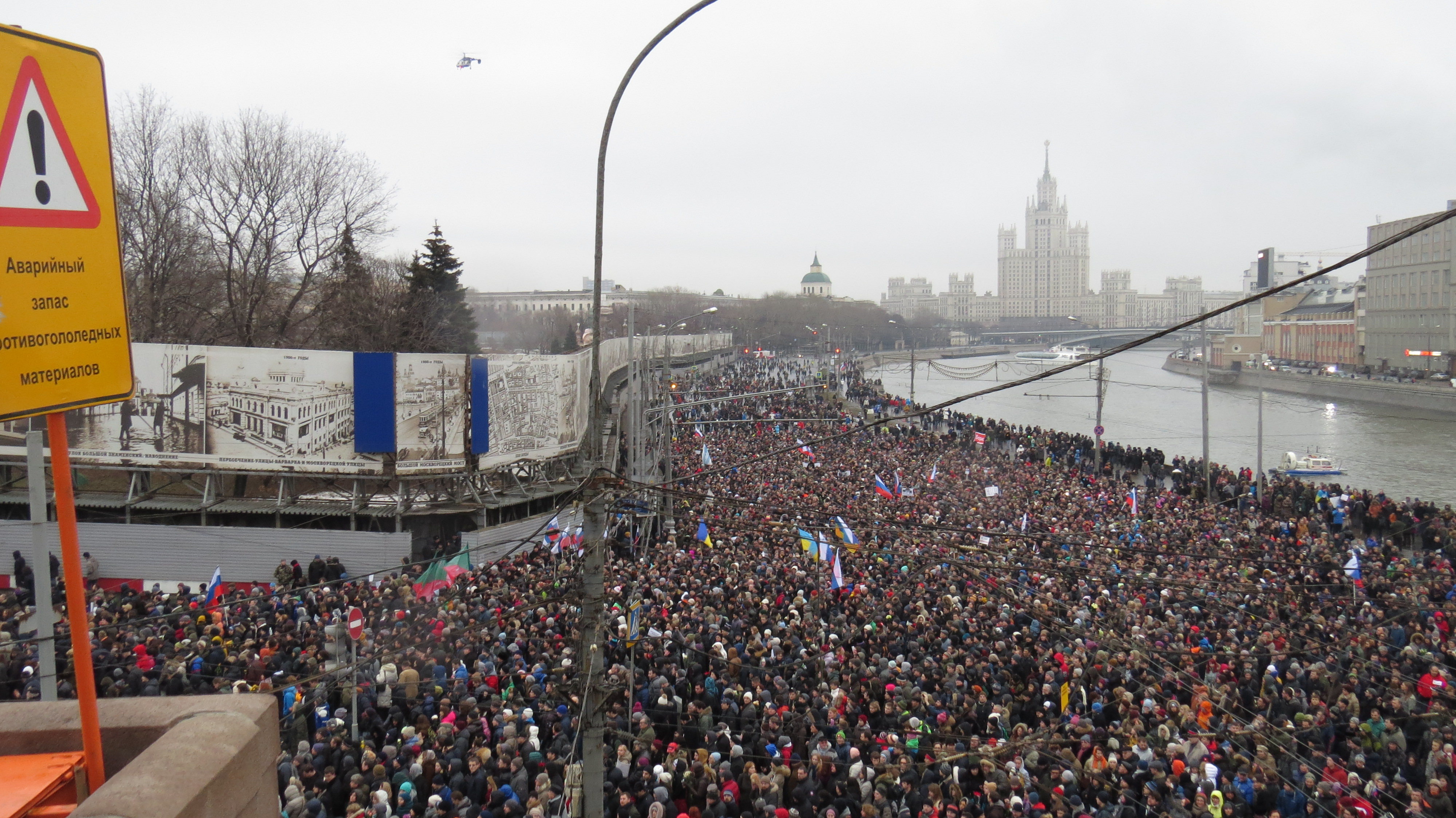 Марш памяти Бориса Немцова в Москве.